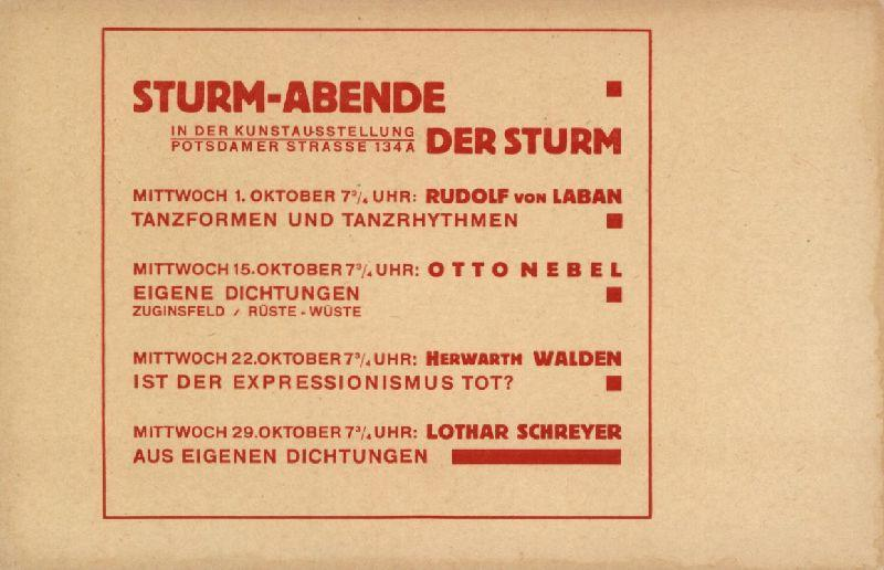 Einladungskarte Sturm-Abende in der Kunstausstellung DER STURM, Potsdamer Strasse 134a, ca. 10,4 x 15,8 cm, einseitig bedruckt. Veranstaltungen im Oktober 1924 mit Rudolf von Laban, Otto Nebel, Herwarth Walden und Lothar Schreyer